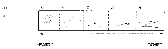 Faktuuride rida matemaatiliste mõistete "punkt" ja "joon" mõjuväljas: a) rea elemendi number, b) faktuuride rida teljel "punkt" – "joon". Element 0 kuulub "punkti" mõjuvälja. Elemendid 1,2 ja 3 paiknevad nii "punkti" kui "joone" mõjuväljas: elemendi 1 puhul on tajutav punkti koondumine joonteks, elemendis 2 see protsess süveneb, elemendis 3 on selgelt eristatavad jooned. Element 4 kuulub "joone" mõjuvälja